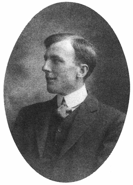 O.G.S. Crawford